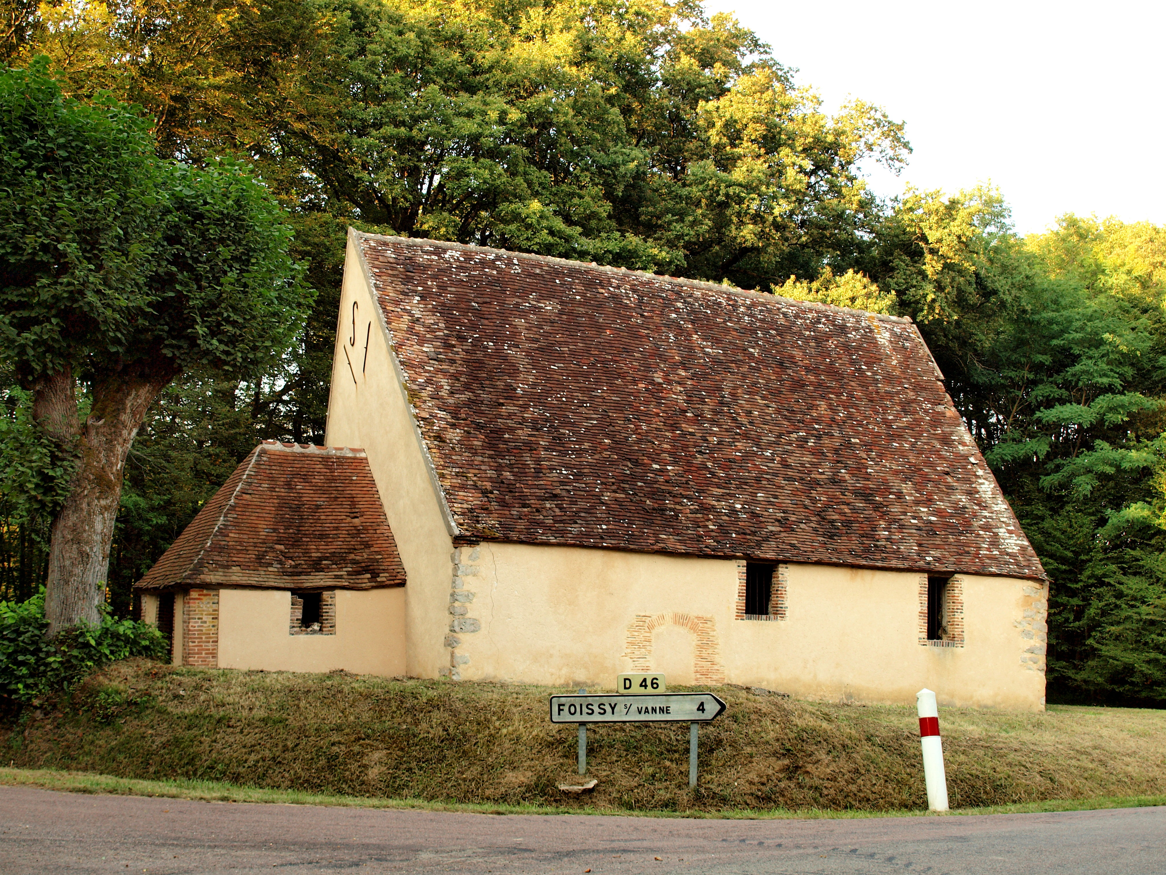 Les Clérimois (Yonne, France)